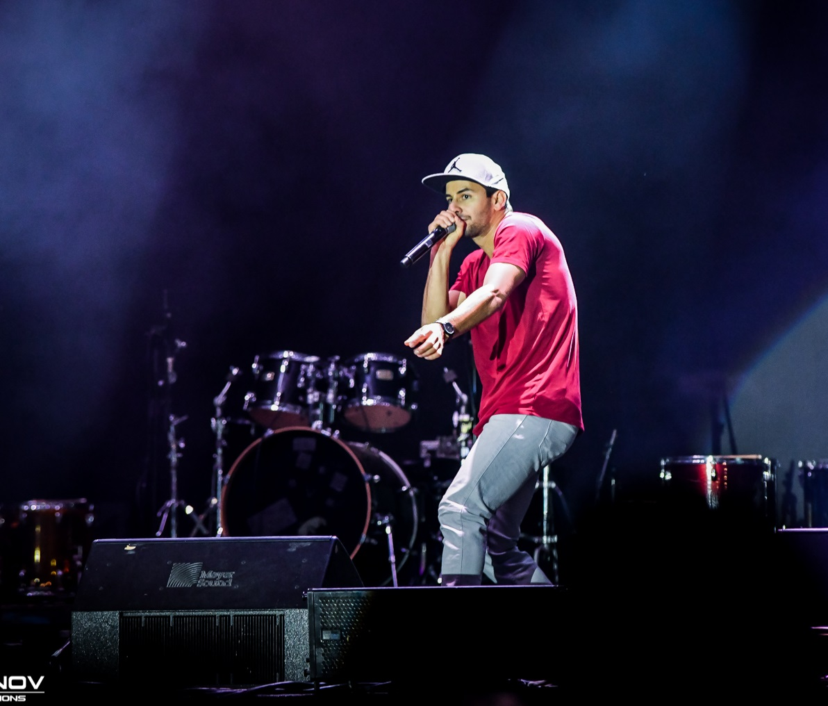 סטפר בהופעה